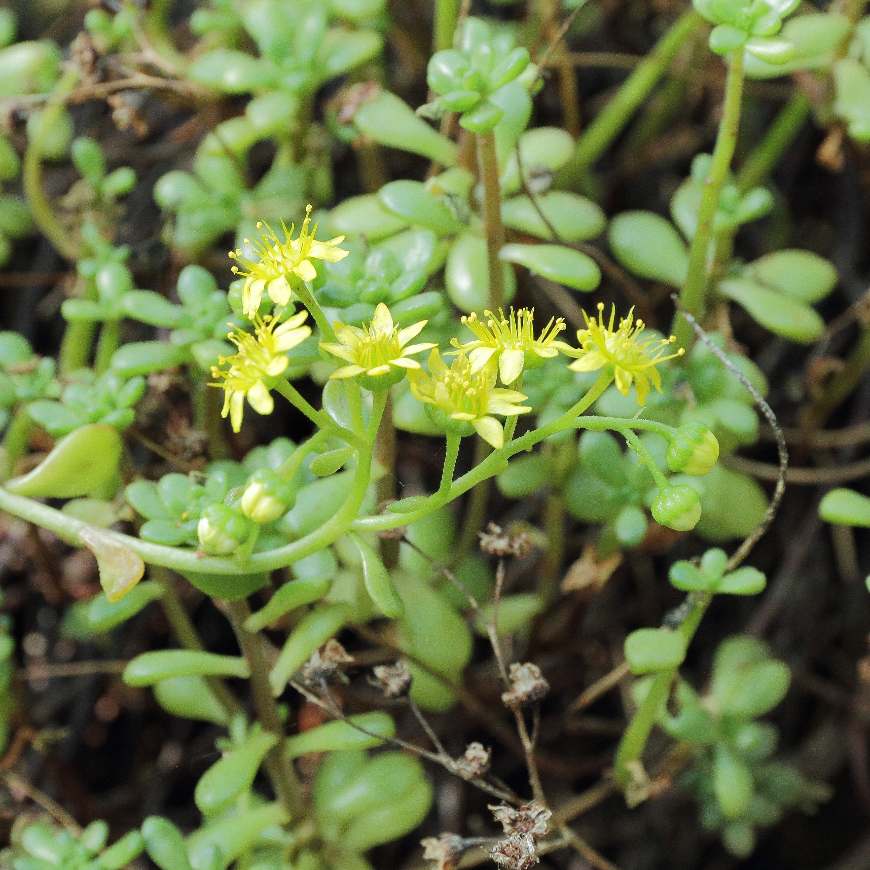 Aeonium sedifolium i Bergianska trädgården.